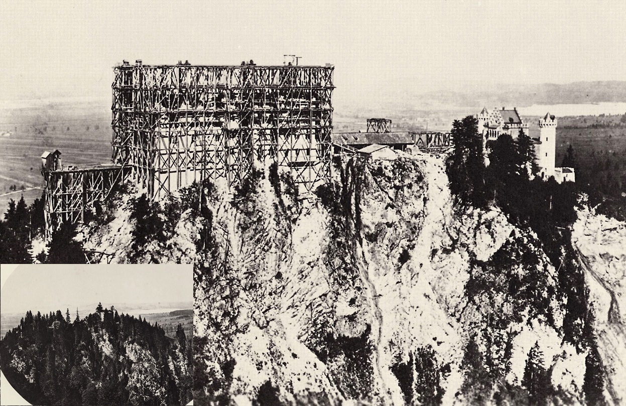 Neuschwanstein, Baustelle 1875 und kleine Ansicht 1860, vor Baubeginn